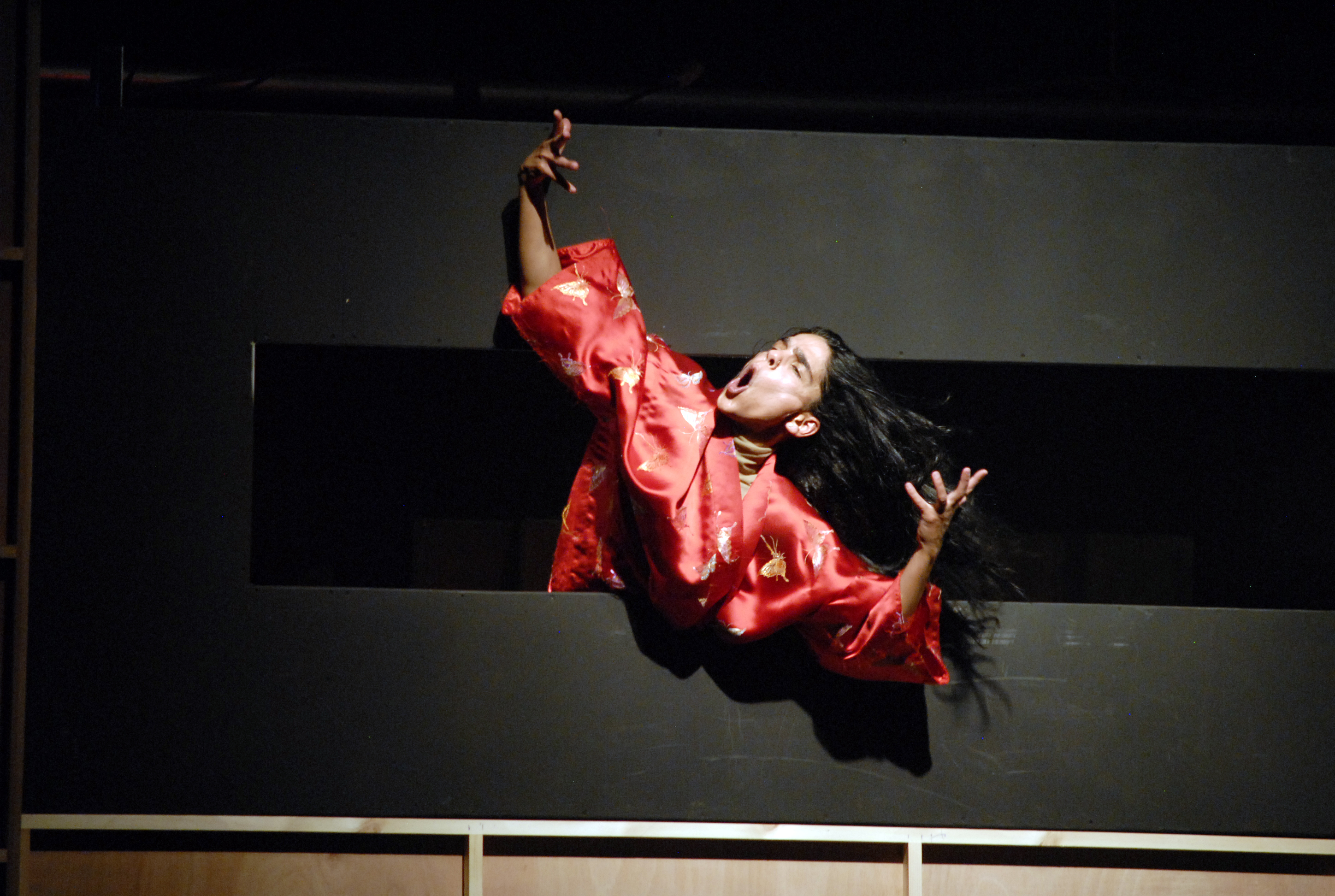 מופע של להקת המחול הקיבוצית